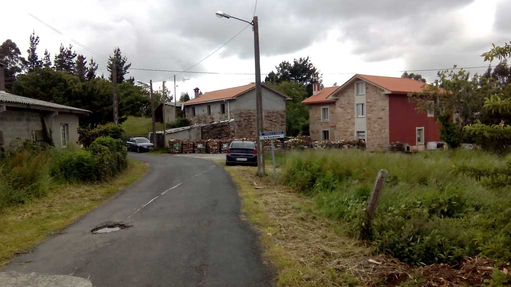 Vista dos Sardiñas, Cabanas.